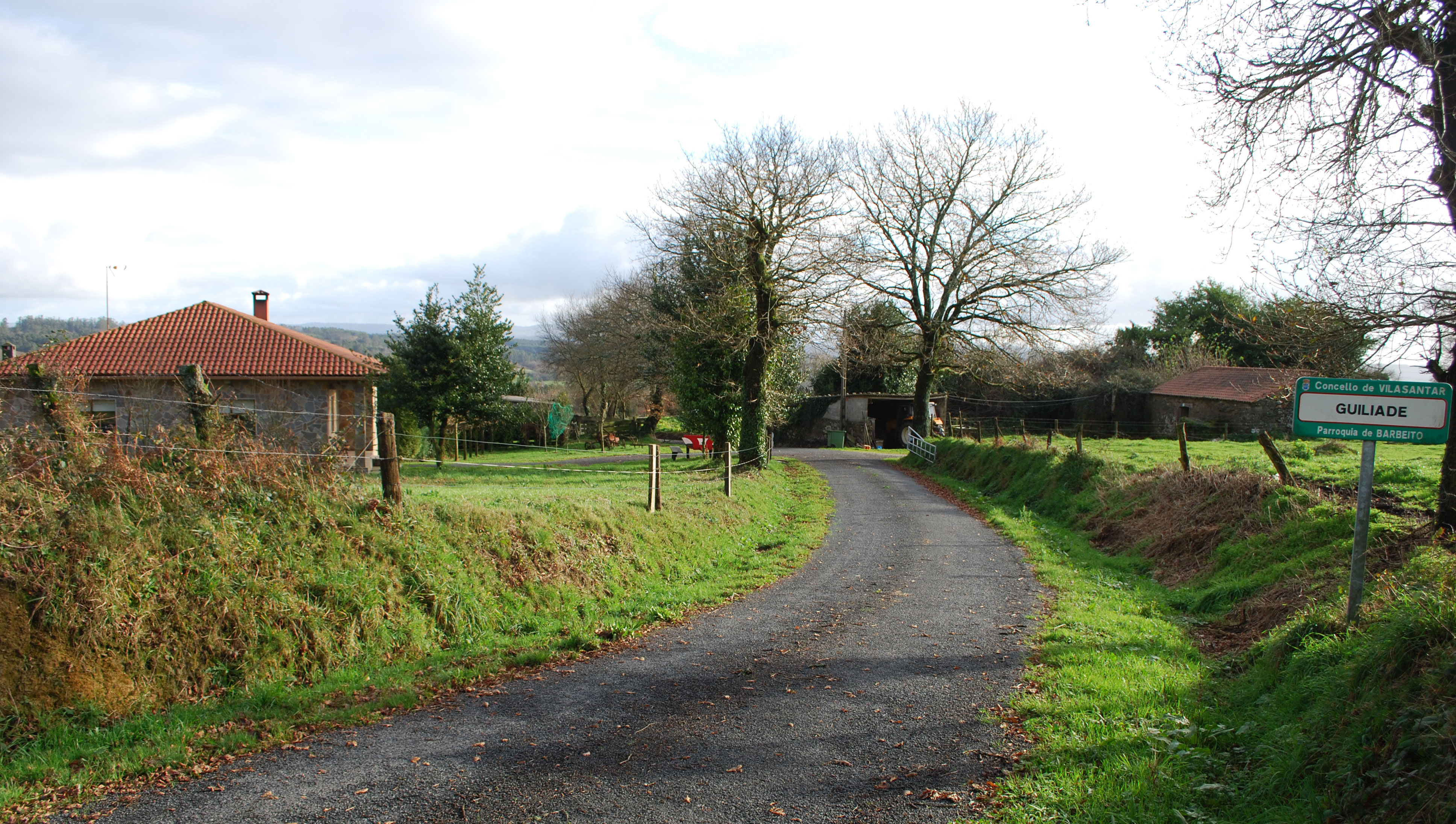 Vista de Guiliade parroquia de Barbeito, concello de Vilasantar provincia de A Coruña, Galiza Spain